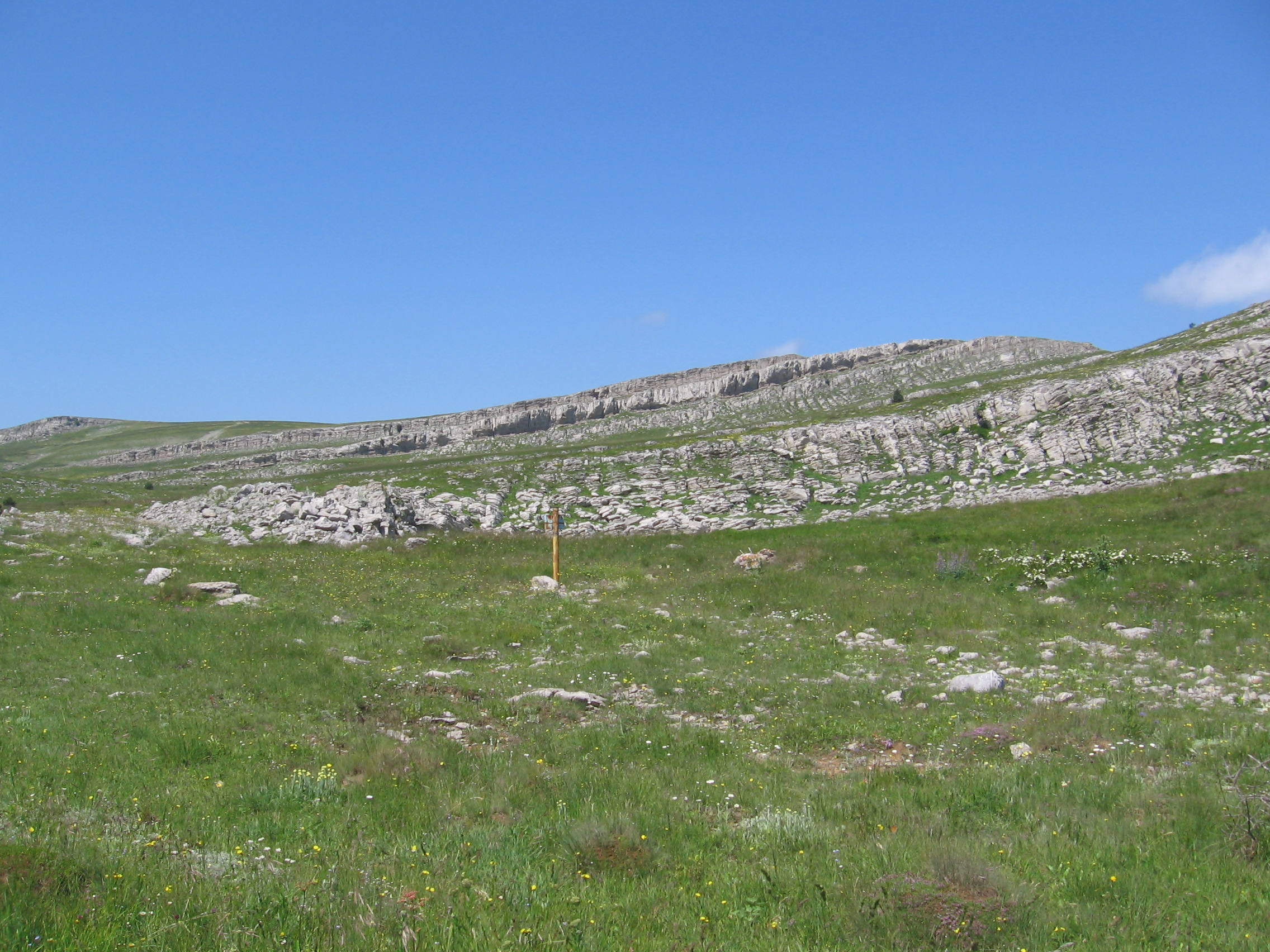 Фото